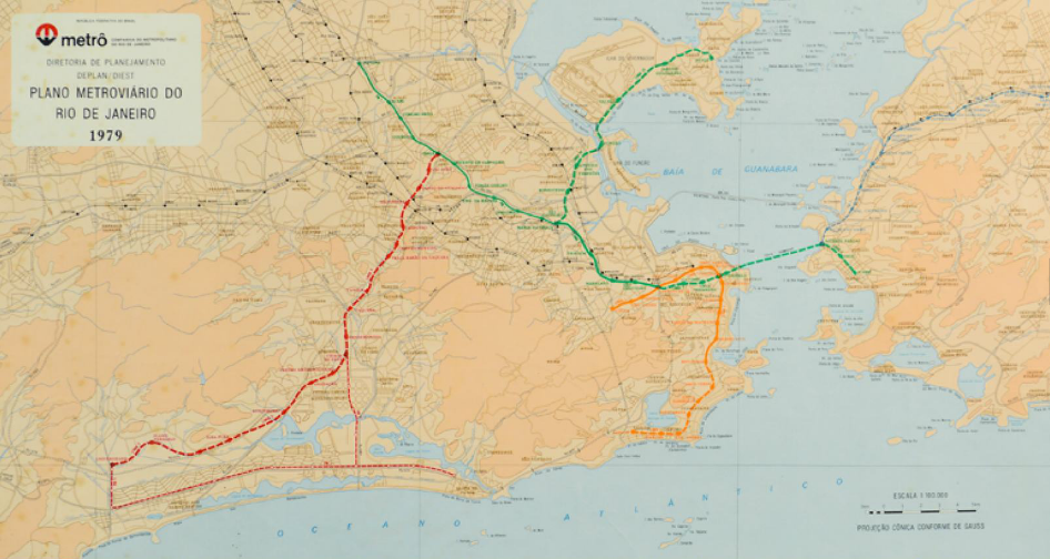 Planejamento das futuras linhas do Metro do Rio de Janeiro, em 1979.